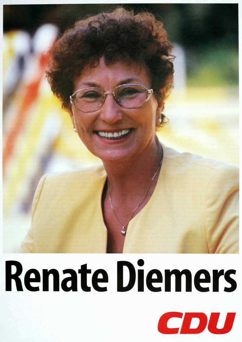 Renate Diemers CDUAbbildung:PorträtfotoPlakatart:Kandidaten-/Personenplakat mit PorträtObjekt-Signatur:10-001: 5026Bestand:Plakate zu Bundestagswahlen (10-001)GliederungBestand10-18:Plakate zu Bundestagswahlen (10-001) » Die 14. Bundestagswahl am 27. September 1998 » CDU » Mit PorträtfotoLizenz:KAS/ACDP 10-001: 5026 CC-BY-SA 3.0 DE